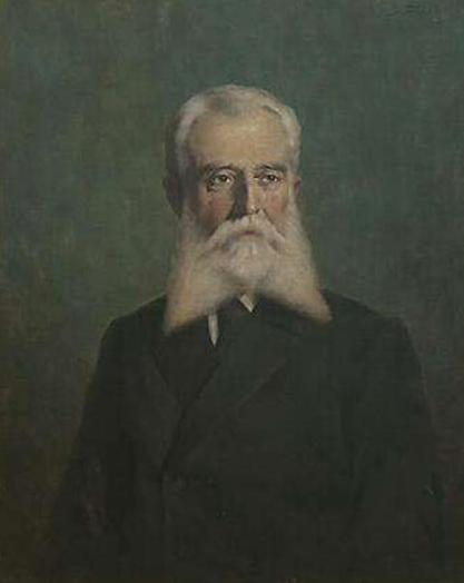 Friedrich von Esmarch (1823–1908)